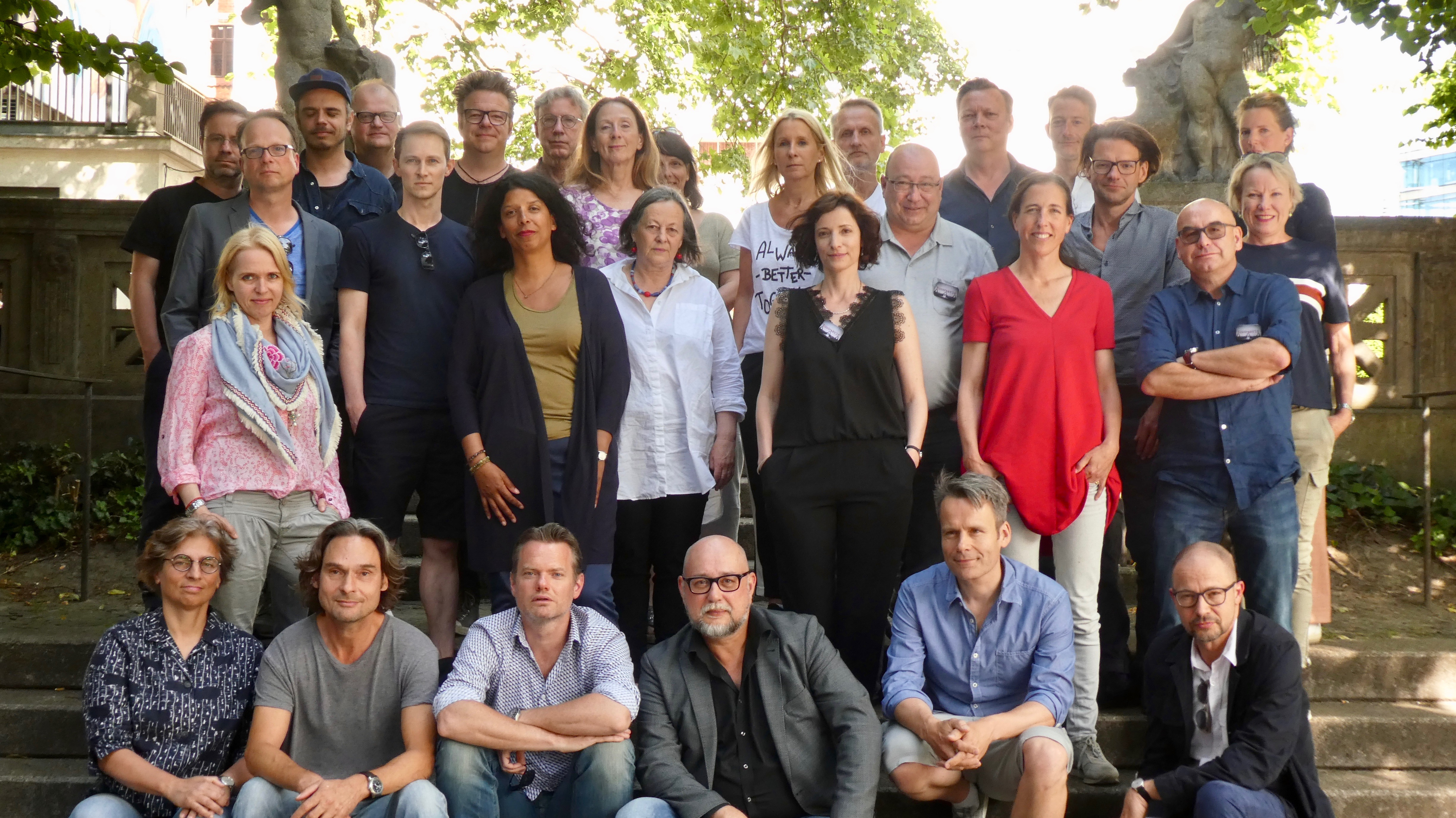 Gründungs-Mitglieder Drehbuchautoren-Initiative "Kontrakt 18"